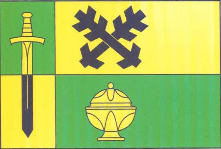 Mařenice vlajka